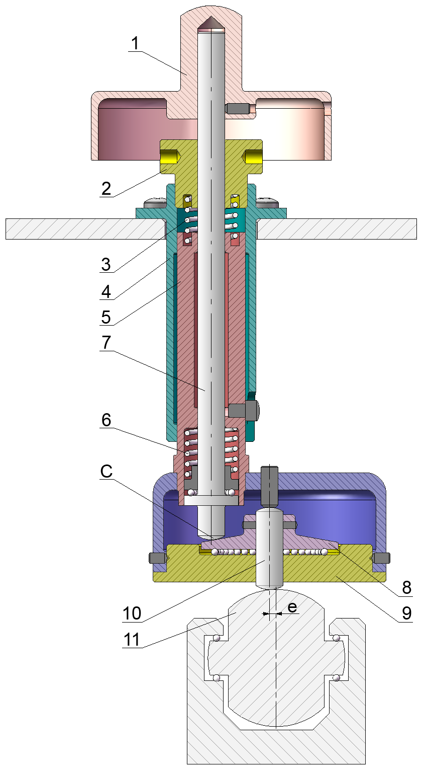 Dwustopniowa przekładnia cierna do precyzyjnego nastawiania prowadnicy w komparatorze Abbego